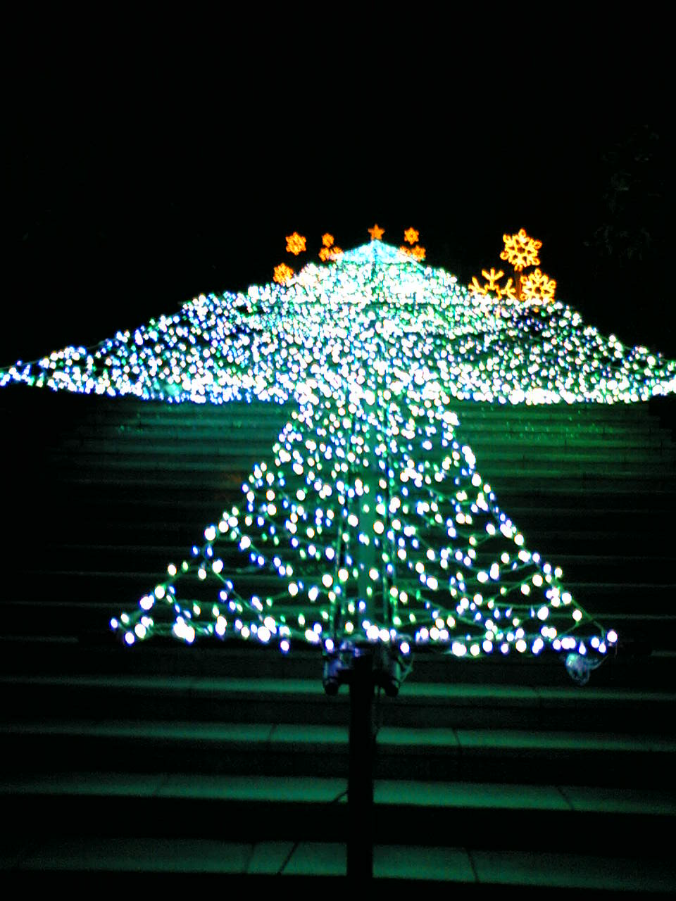 フラワーパークかごしまのイルミネーションの写真